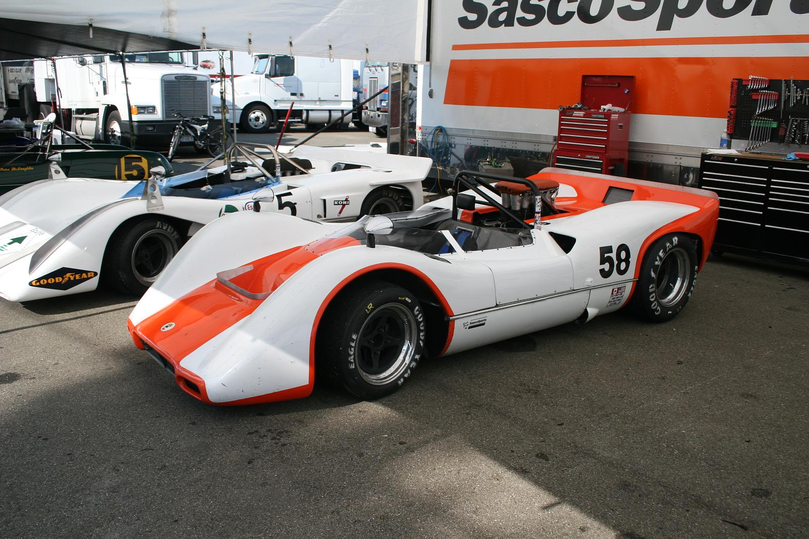 58 - 1968 McLaren M6B (406cid) Dave Handy